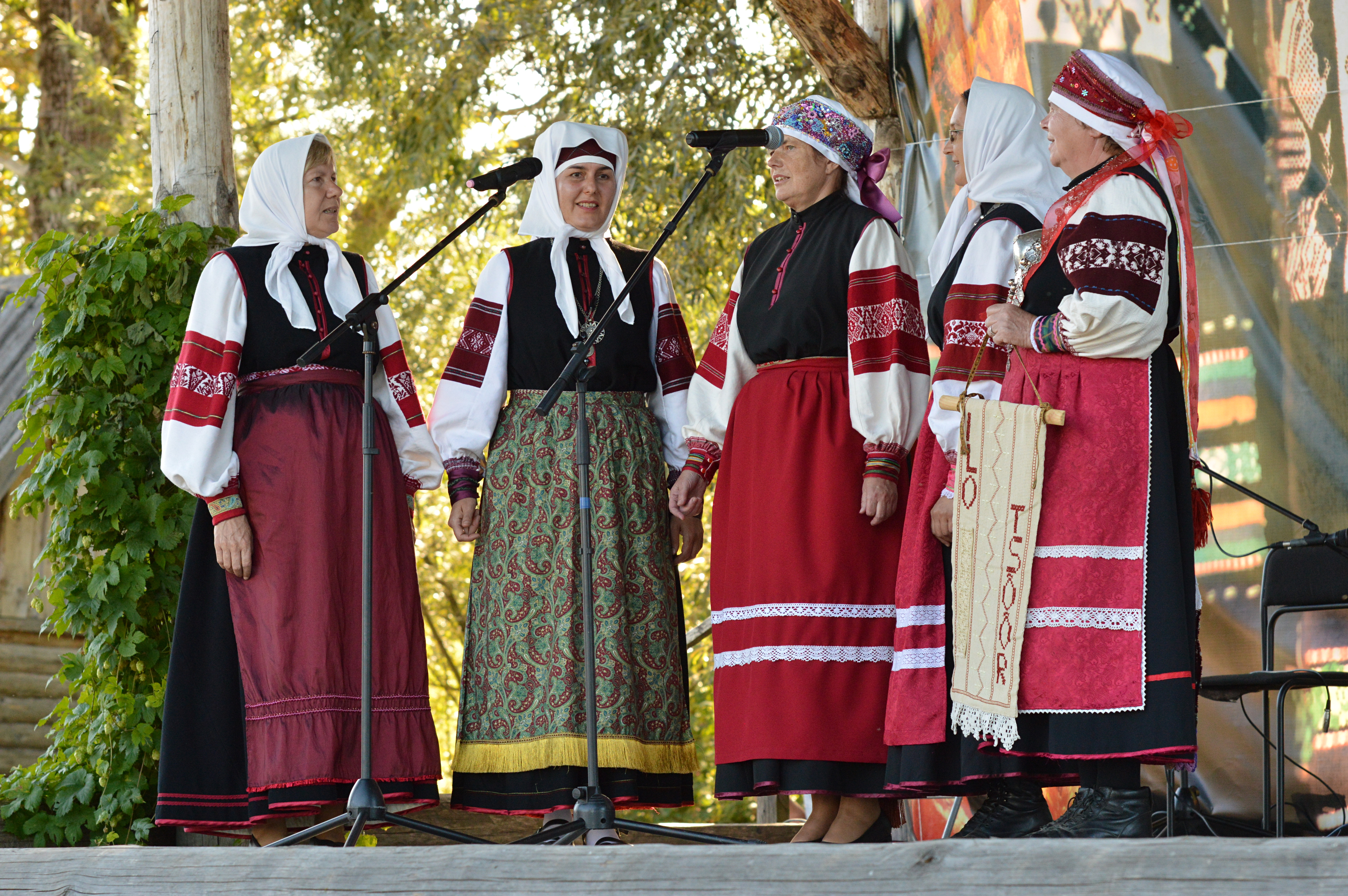 Põlva leelokoor Ilotsõõr. Seto kultuuri festival Radajal.